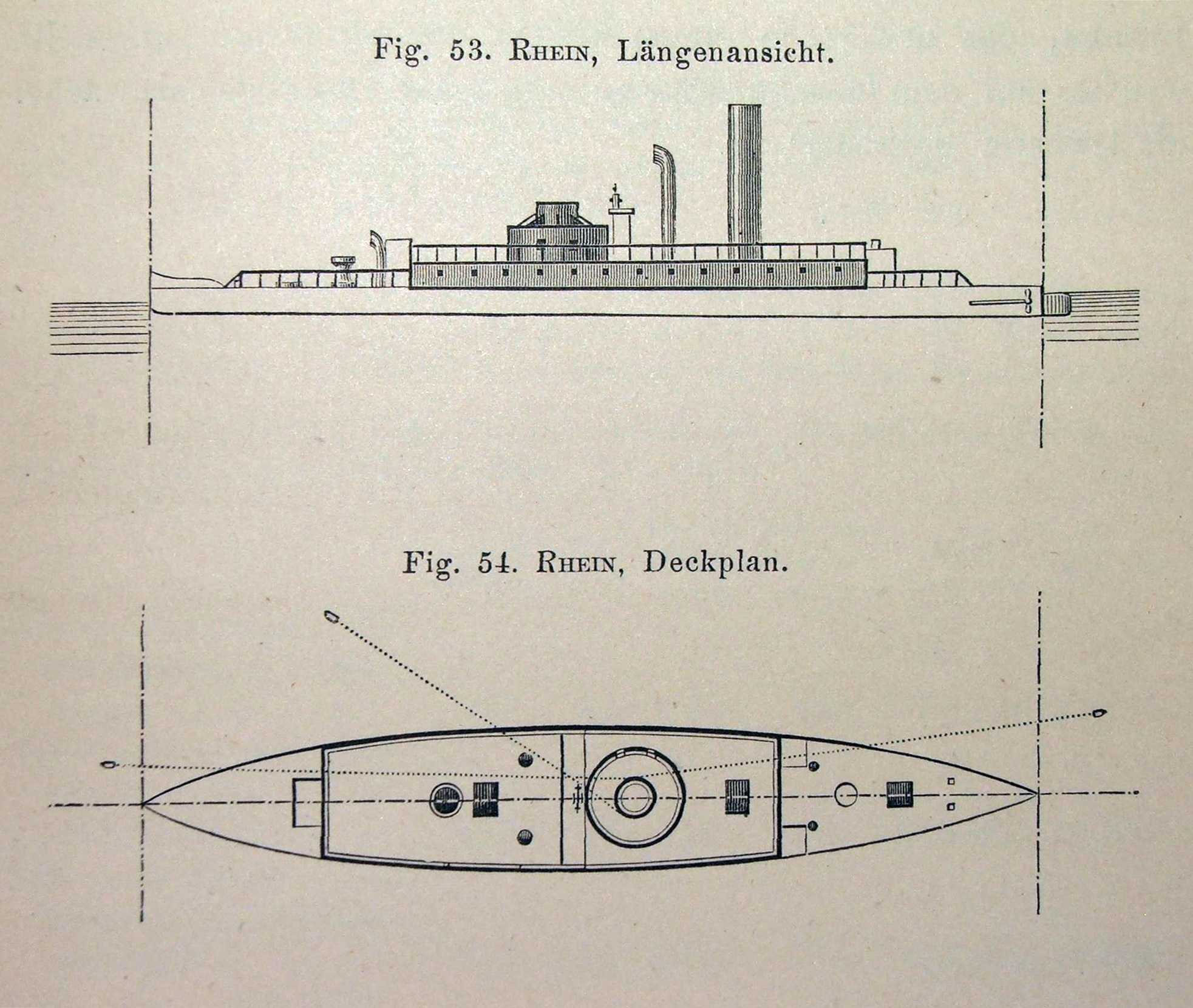 SMS Rhein aus: von Kronenfels, J. F.: Das schwimmende Flottenmaterial der Seemächte. Eine kurzgefasste Beschreibung der wichtigsten europäischen, amerikanischen und asiatischen Kriegsschiffe der neueren und neuesten Zeit. A. Hartleben's Verlag, Wien. Pest. Leipzig 1881.